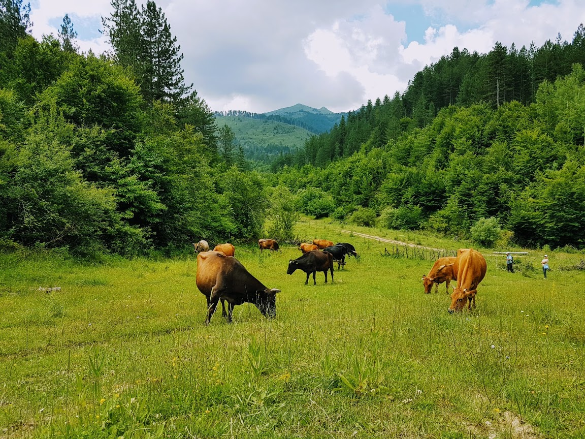 Kope me lopë kullosin në luadhet buzë lumit Devoll.